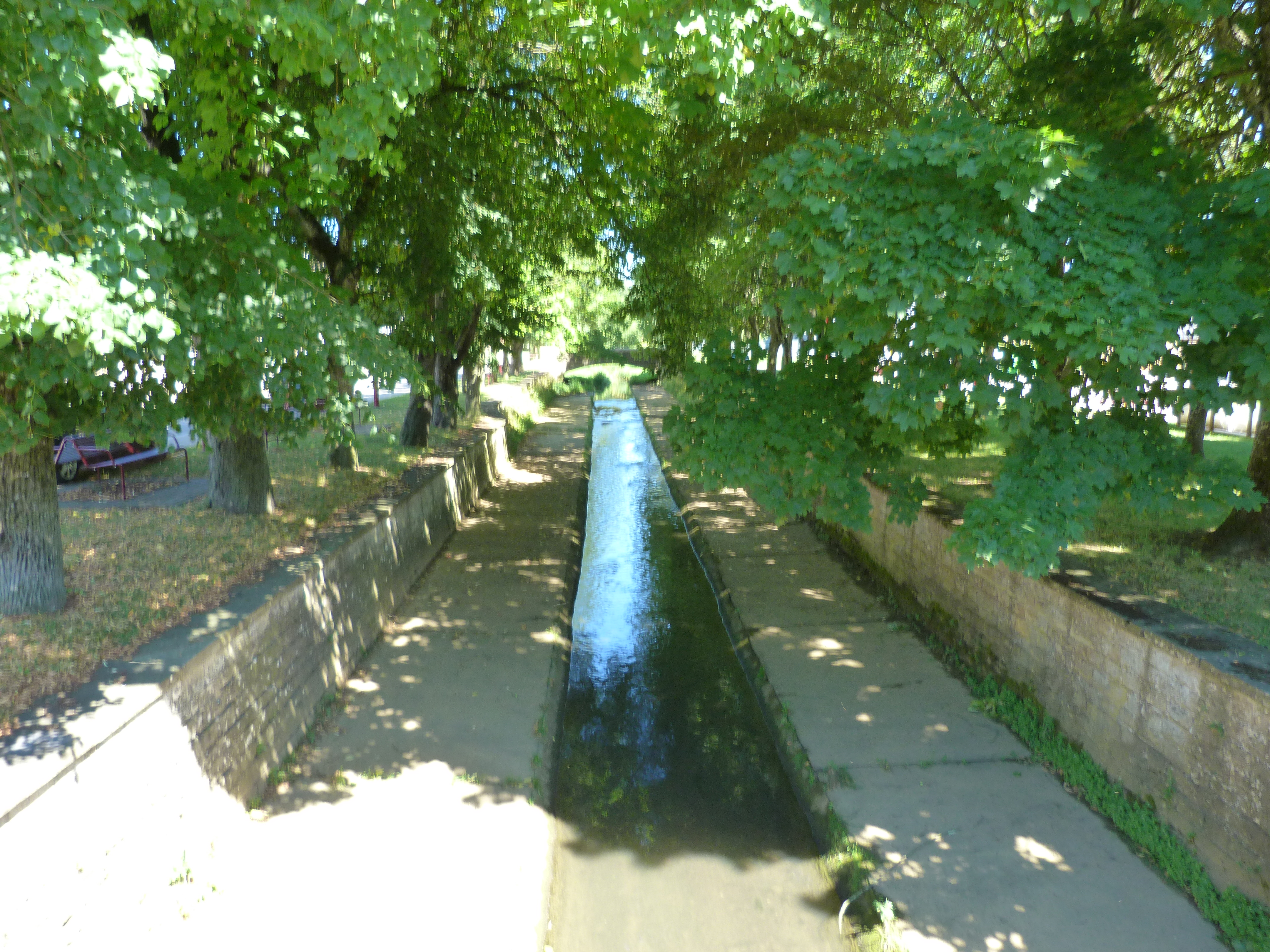 La Batte traversant Musson à hauteur de la place en août 2013